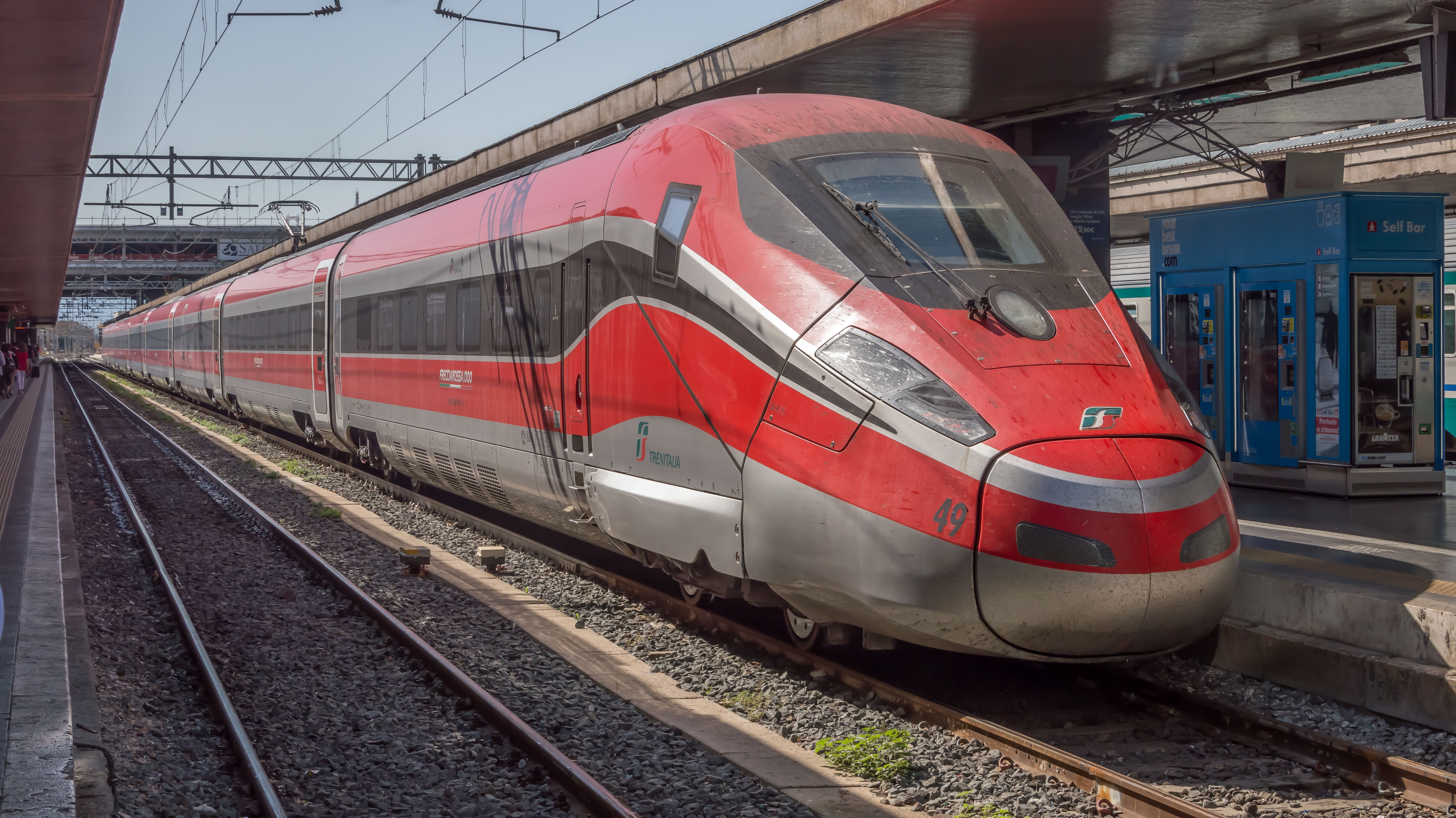 Uit een serie van 50 hogesnelheidstreinstellen gebouwd door het concortium van Bombardier Transportation en AnsaldoBreda is de Frecciarossa 1000 ontstaan. In deze treinstellen zitten basis onderdelen van de bij ons geflopte V250. Vanaf de zomer van 2015 zijn de treinstellen in dienst, met een gemiddelde dienstsnelheid van 300 km/h. Hiermee werd de reistijd tussen Milaan en Rome met 45 min verkort worden tot 2 uur en 55 min. Frecciarossa 1000 stel 49 komt in Rome Termini binnen uit Milano C Le